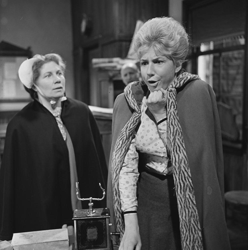 Setfoto van het Nederlandse televisiespel Op Hoop Van Zegen